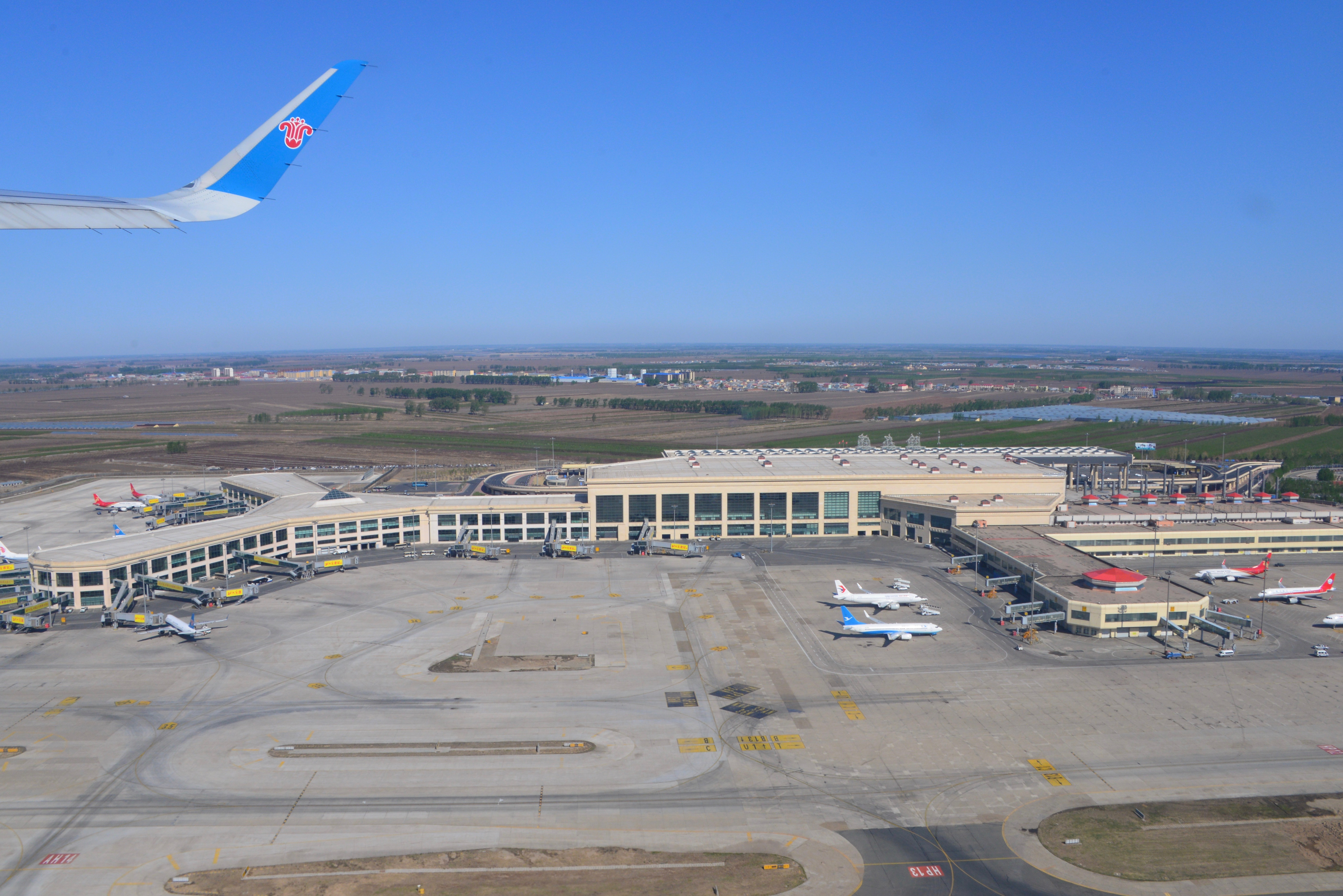 哈尔滨太平国际机场